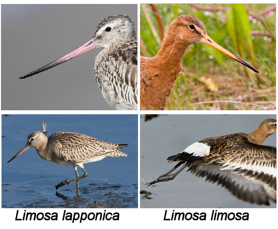 Comparación del pico y la cola de limosa lapponica y limosa limosa